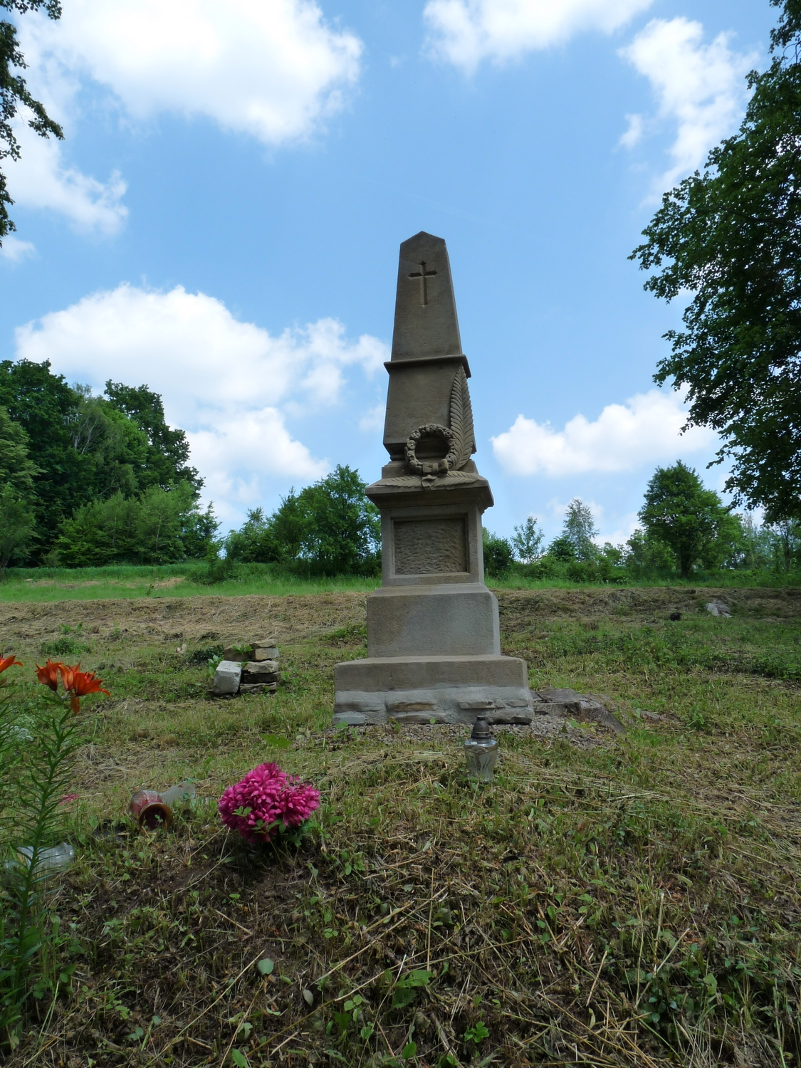 nagrobek Konstantego Bobczyńskiego posła na Sejm Krajowy Galicji na greckokatolickim cmentarzu